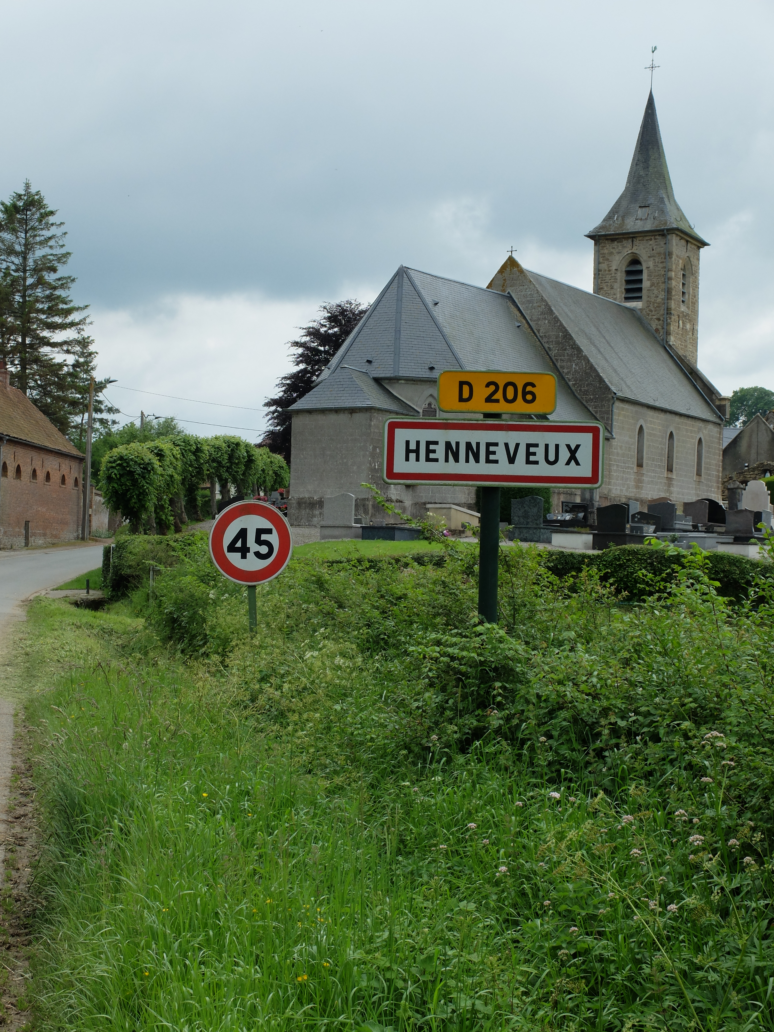 Vue de la route des Prés d'Henneveux. On y voit une entrée de la commune d'Henneveux et l'église Saint-Folquin.